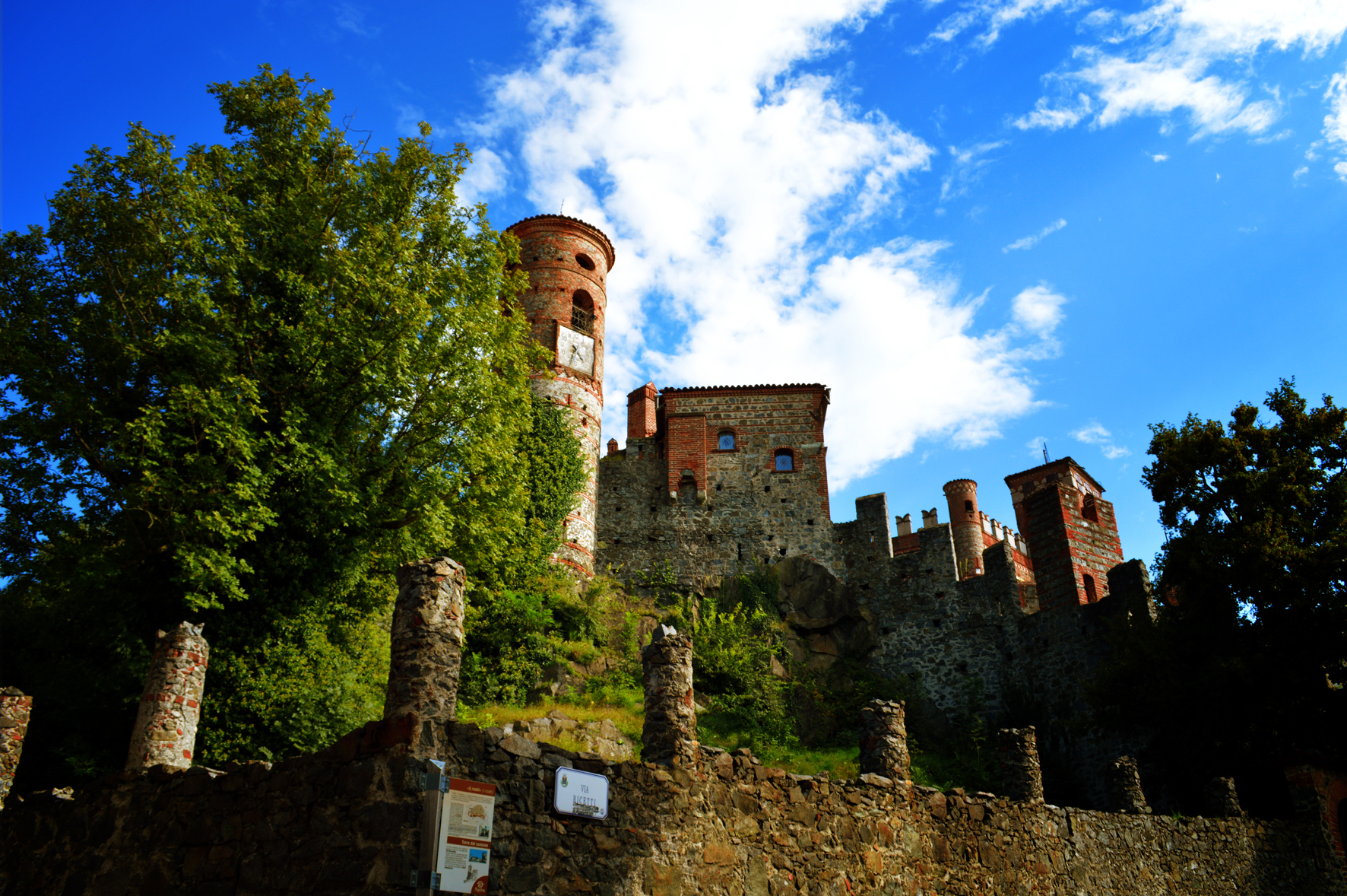 Torre Campanaria This is a photo of a monument which is part of cultural heritage of Italy.